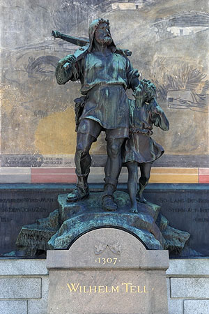 Tell-Denkmal in Altdorf